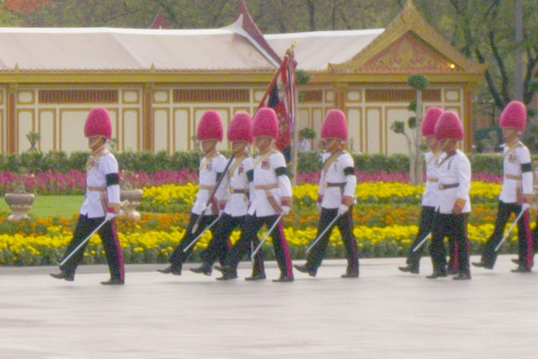 ธงชัยเฉลิมพลของกองพันทหารราบที่ 3 กรมทหารราบที่ 1 มหาดเล็กรักษาพระองค์ ในพระบาทสมเด็จพระมงกุฎเกล้าเจ้าอยู่หัว ระหว่างเชิญไปในกองทหารเกียรติยศสำหรับพระศพ สมเด็จพระเจ้าภคินีเธอ เจ้าฟ้าเพชรรัตนราชสุดา สิริโสภาพัณณวดี ในการพระราชพิธีพระราชทานเพลิงพระศพ ณ พระเมรุท้องสนามหลวง วันที่ 9 เมษายน พ.ศ. 2555